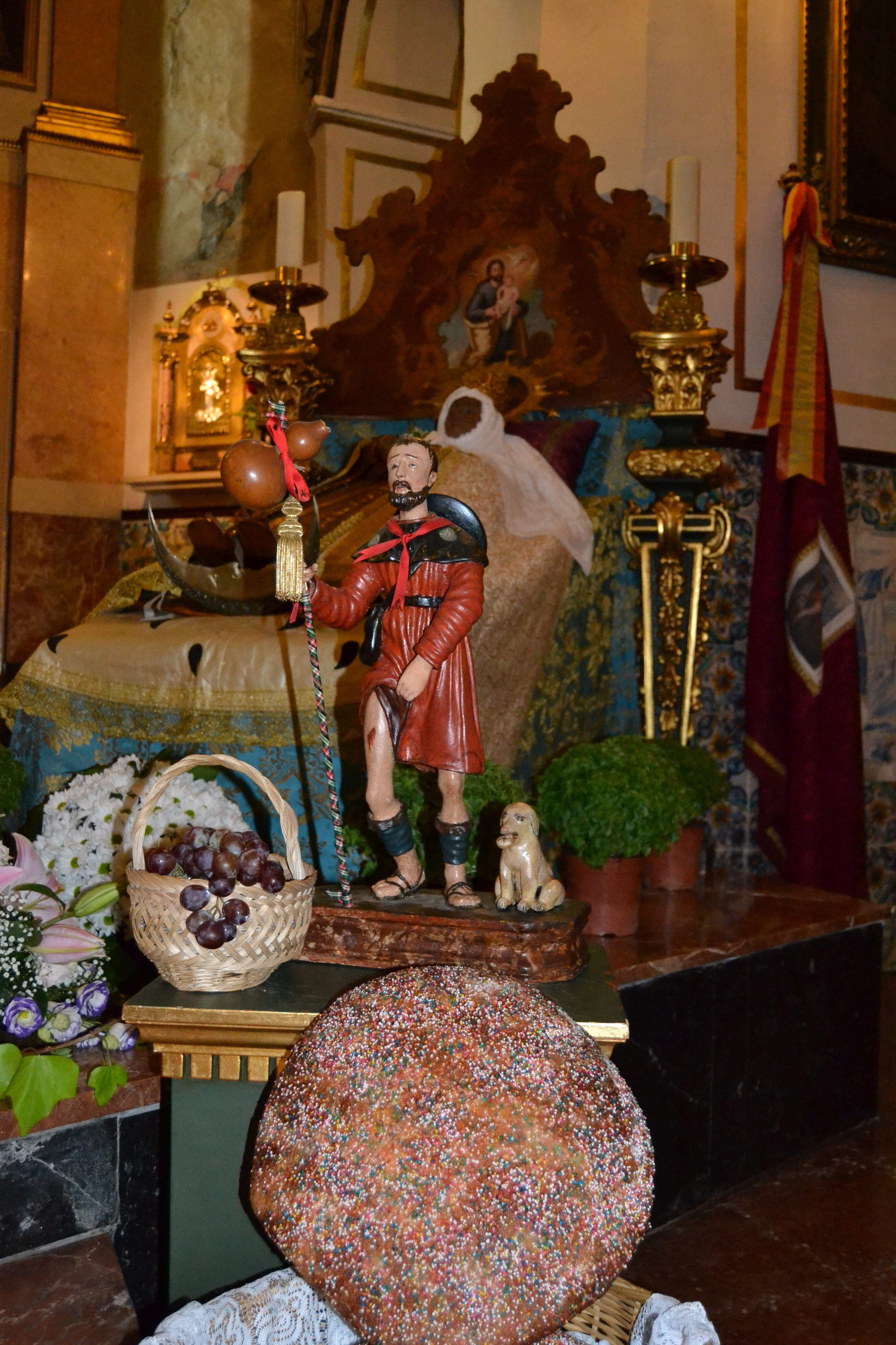 Tal es la cantidad de fiestas que tiene el verano valenciano que en ocasiones se solapan unas con otras. De esta manera el pasado día 15 de agosto coincidió en Requena la ceremonia de la festividad de la Dormición de la Virgen con la de San Roque que todos los años preparara su Mayordomía la víspera de la fiesta del Santo. This is a photography of a Folklore festival in Spain (Wikidata id Q47119479).